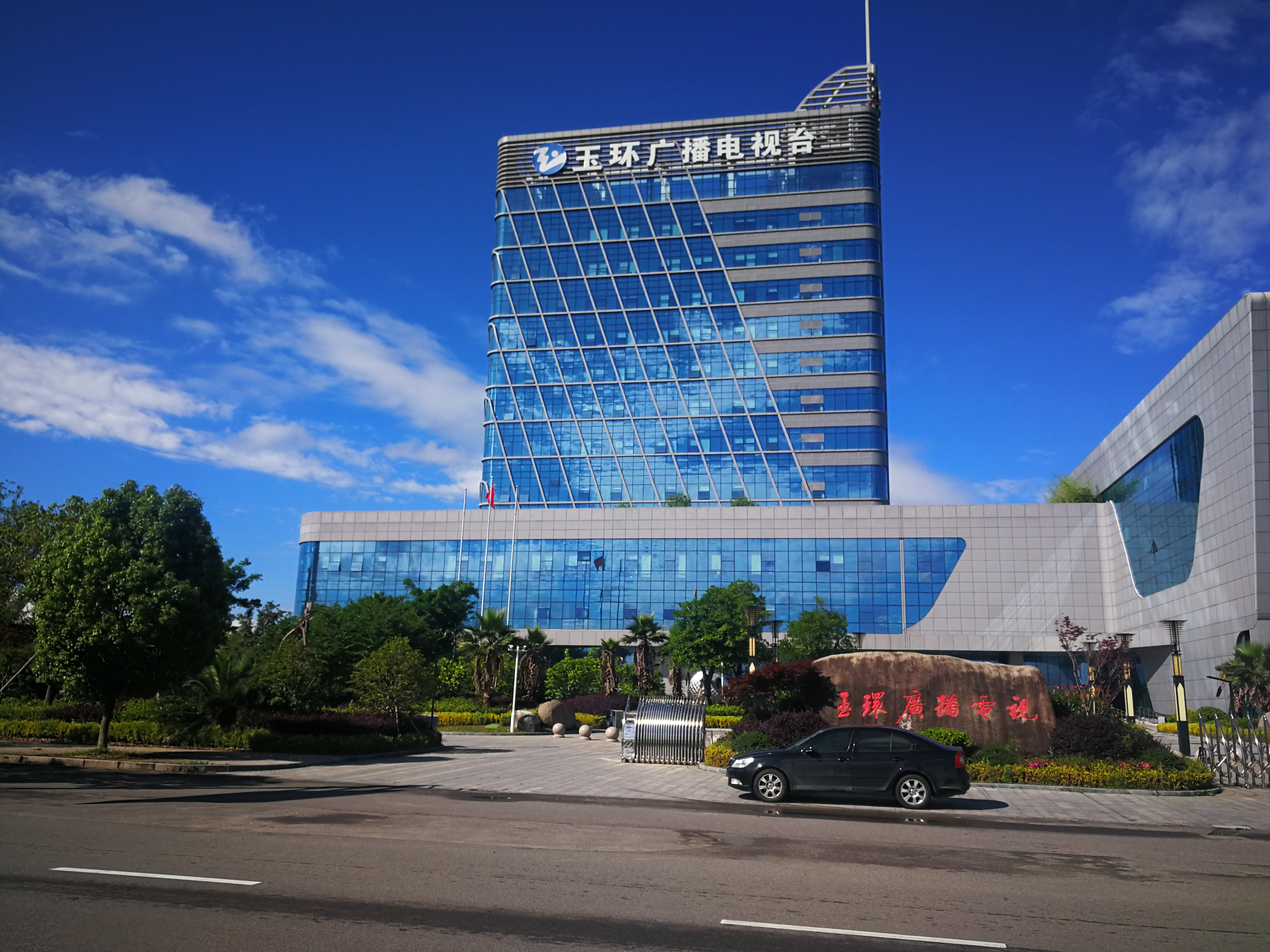 中文（中国大陆）: 玉环市传媒中心大楼